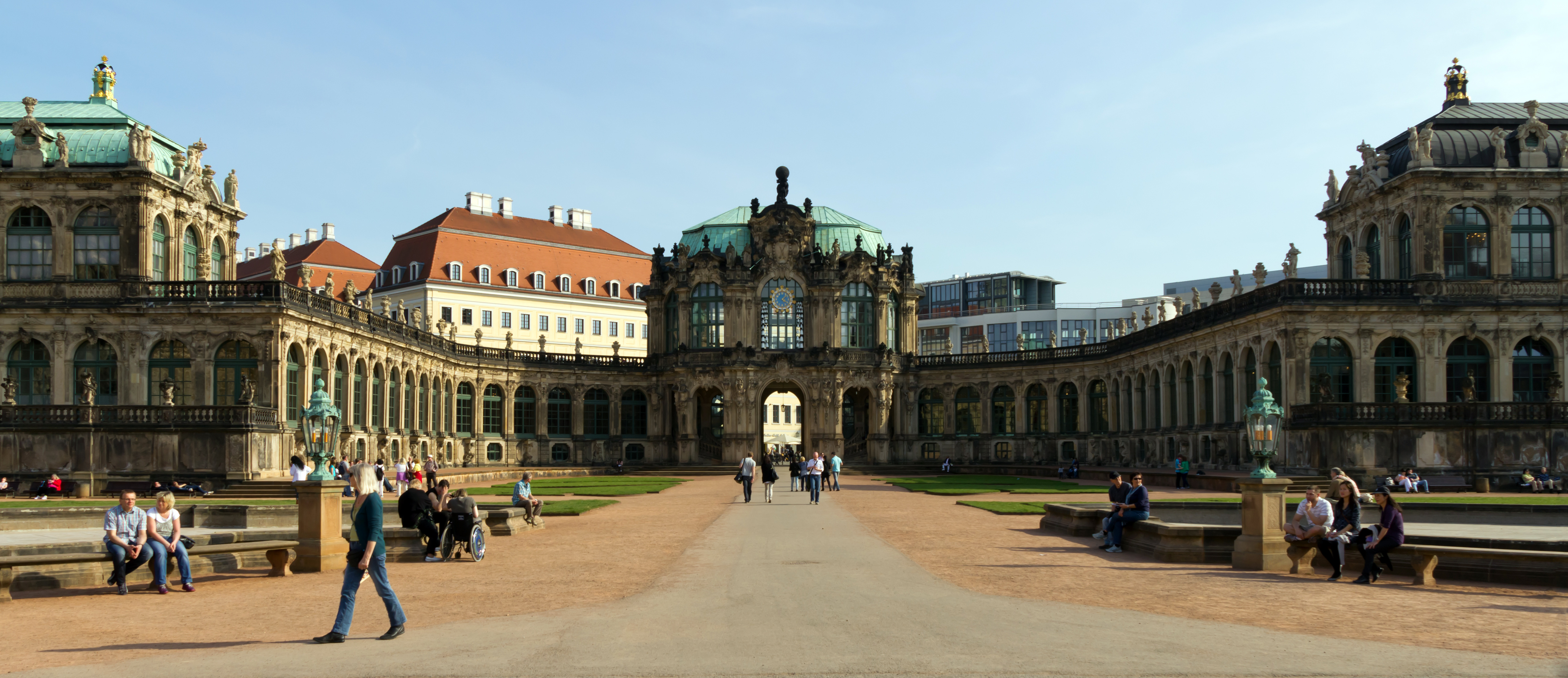 Stadtpavillon des Dresdner Zwinger mit Bogengalerien